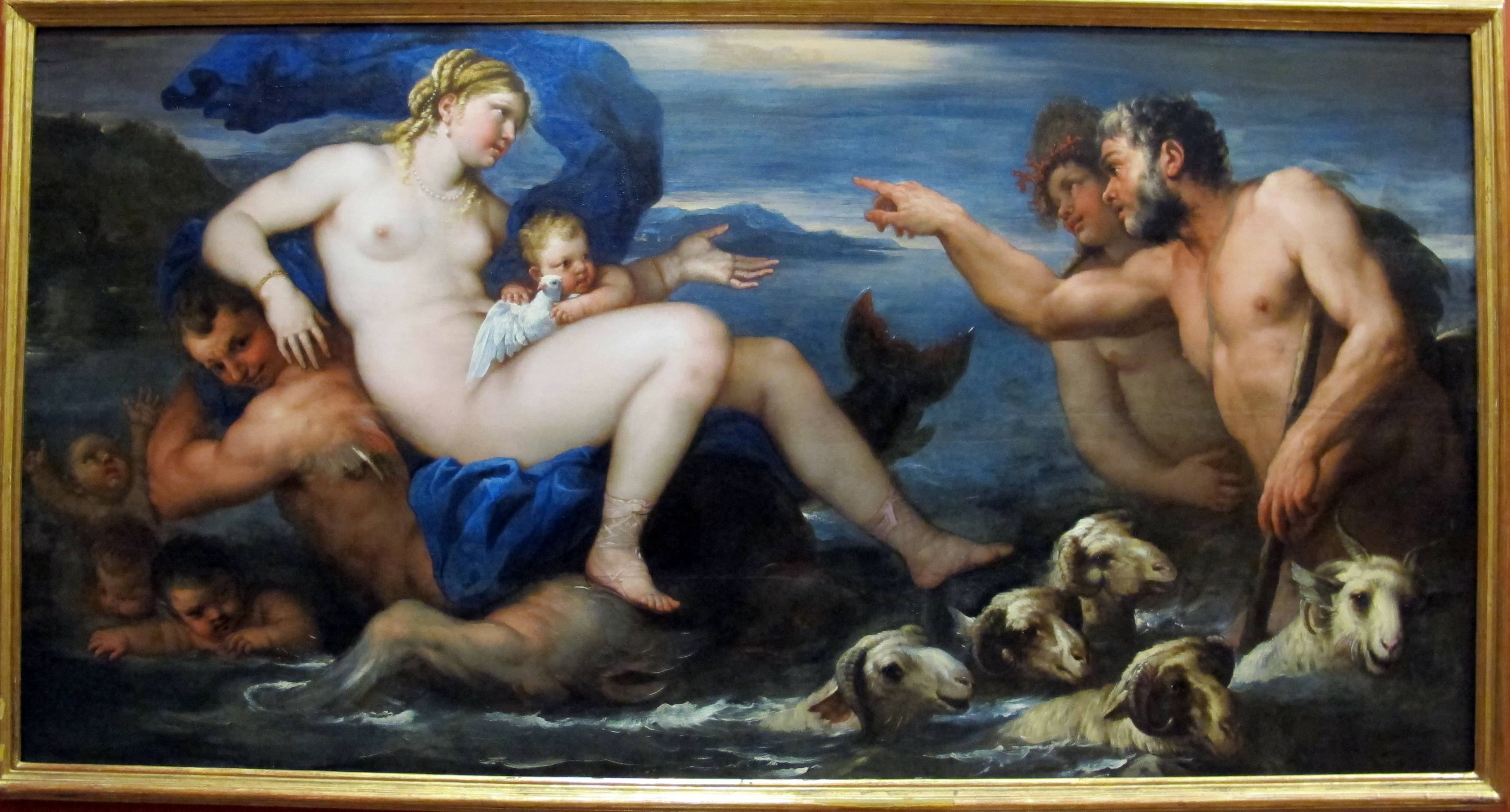 Galleria Napoletana (Museo di Capodimonte)